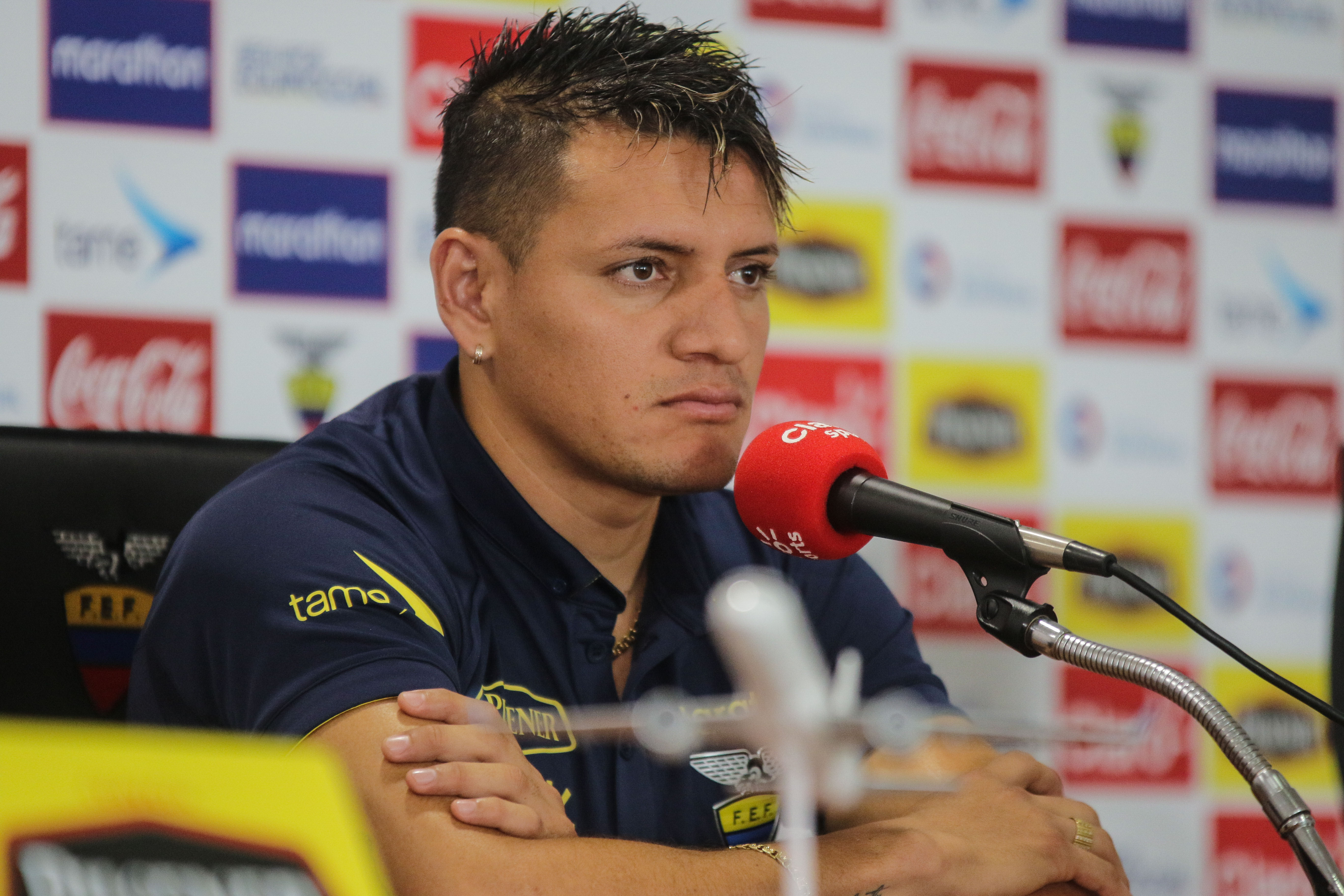 Quito 6 Oct (ANDES).- Carlos Garcés hablan ante la prensa nacional e internacional. Fotografías: Carlos Rodríguez/Andes.